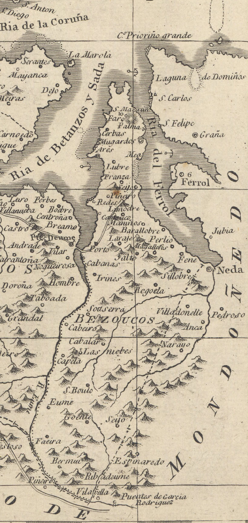 Arciprestado de Bezoucos no mapa do arcebispado de Santiago de Compostela realizado por Angel Marin, cura de S. Salvador de Poio.